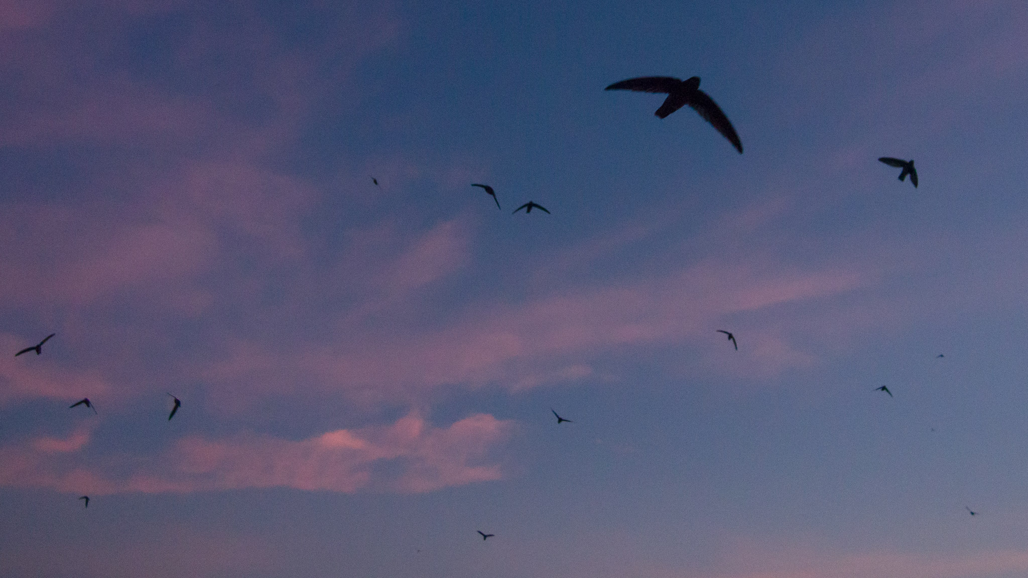 Glossy Swiftlets at Dusk